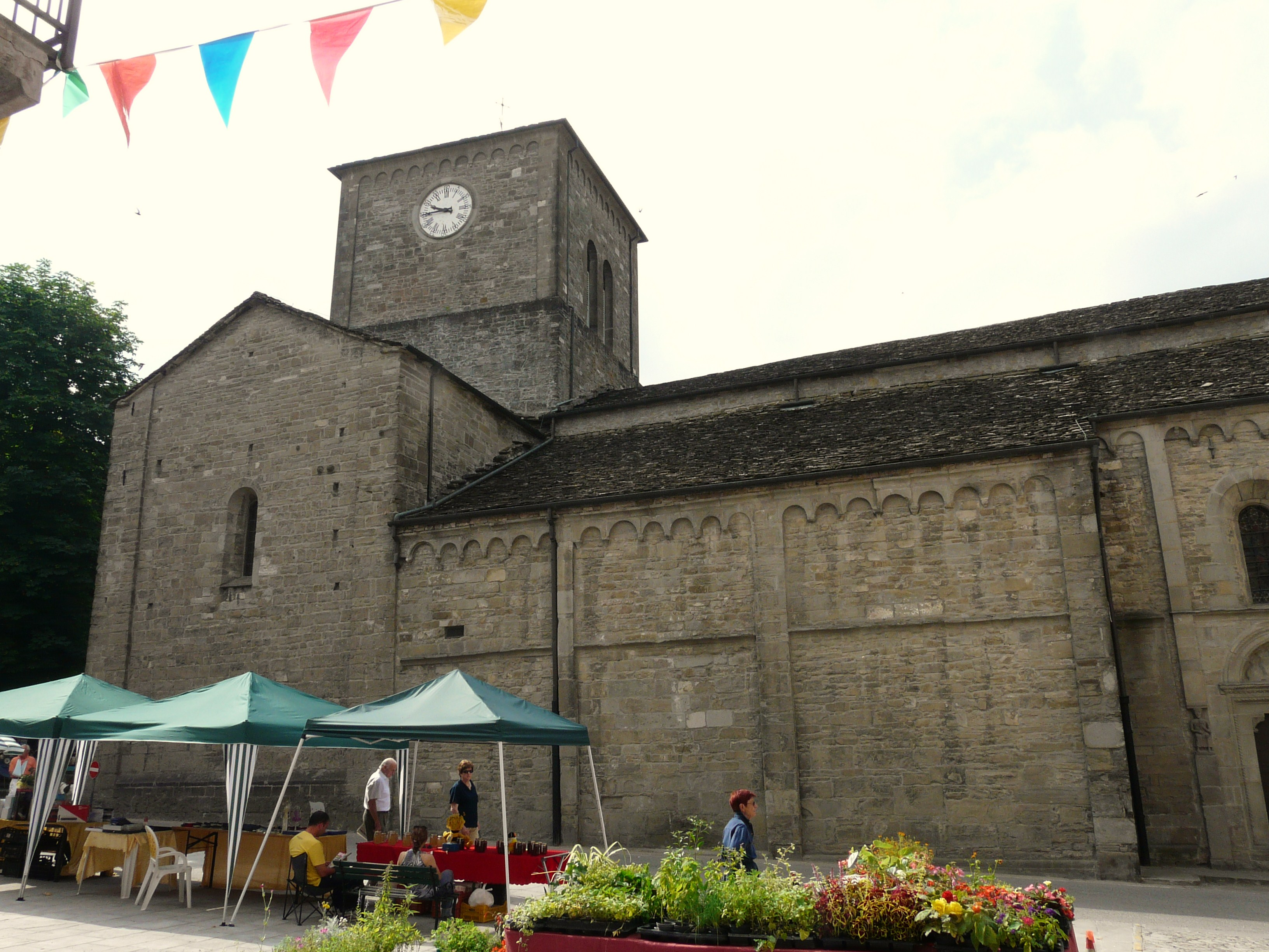 Duomo di Berceto, Emilia Romagna, Italia